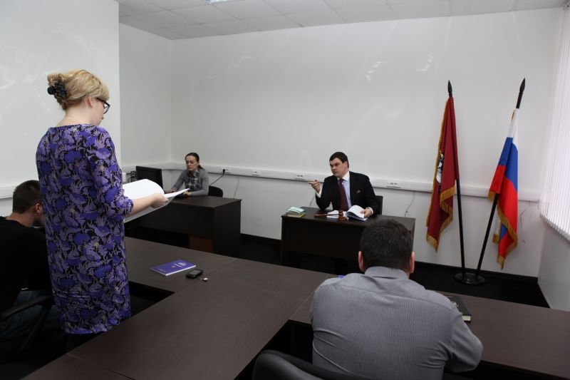 Заседание третейского суда